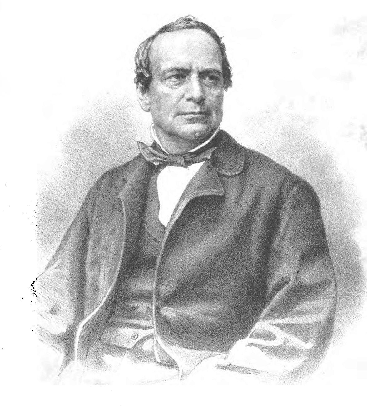 Georg Dahlqvist (1807-1873)